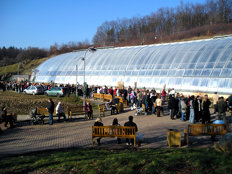 fronta na vstup do pražského skleníku Fata Morgana na výstavu orchidejí v zimě 2007